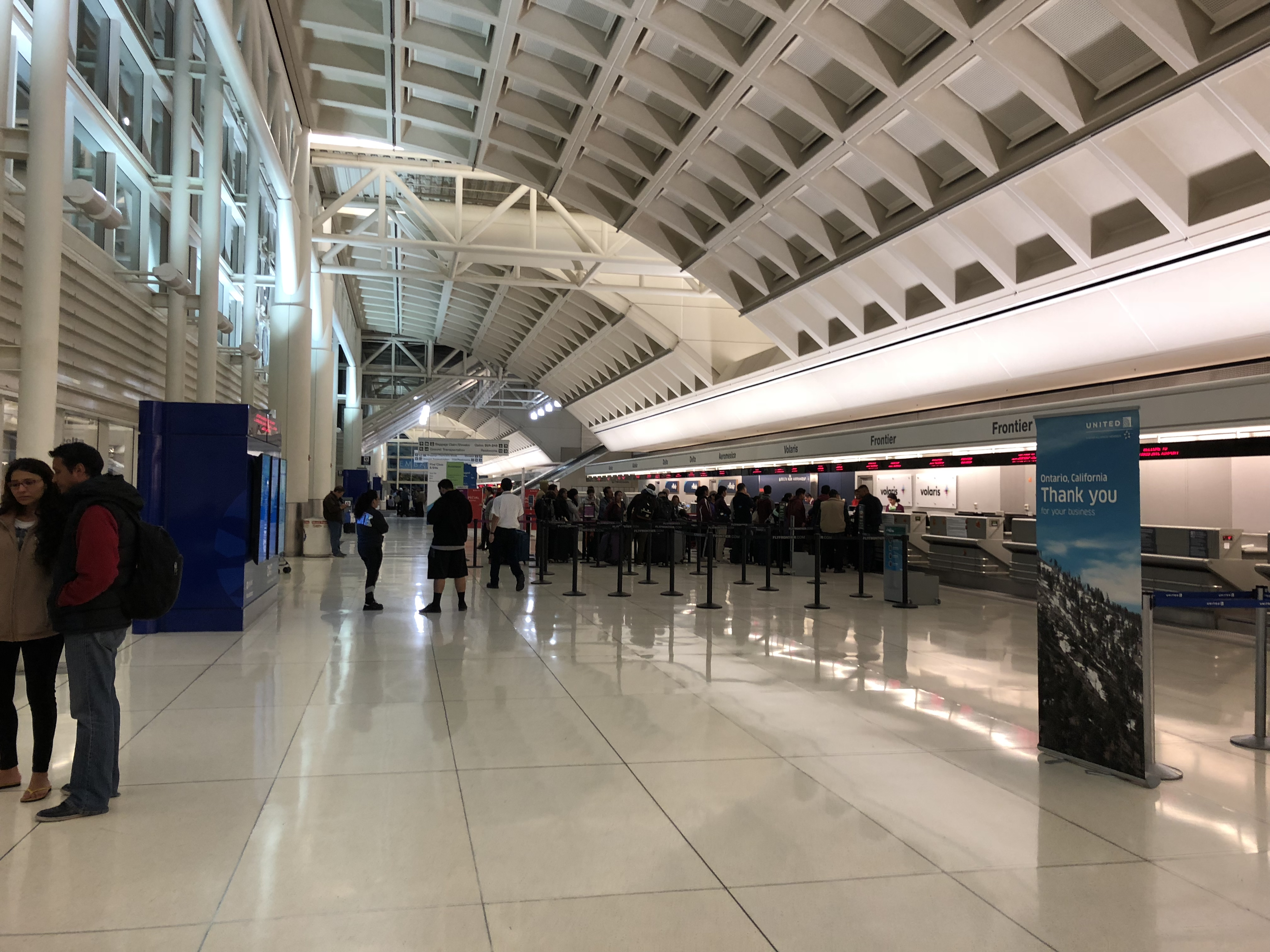 Mostradores de la Terminal 2 del Aeropuerto Internacional de Ontario.